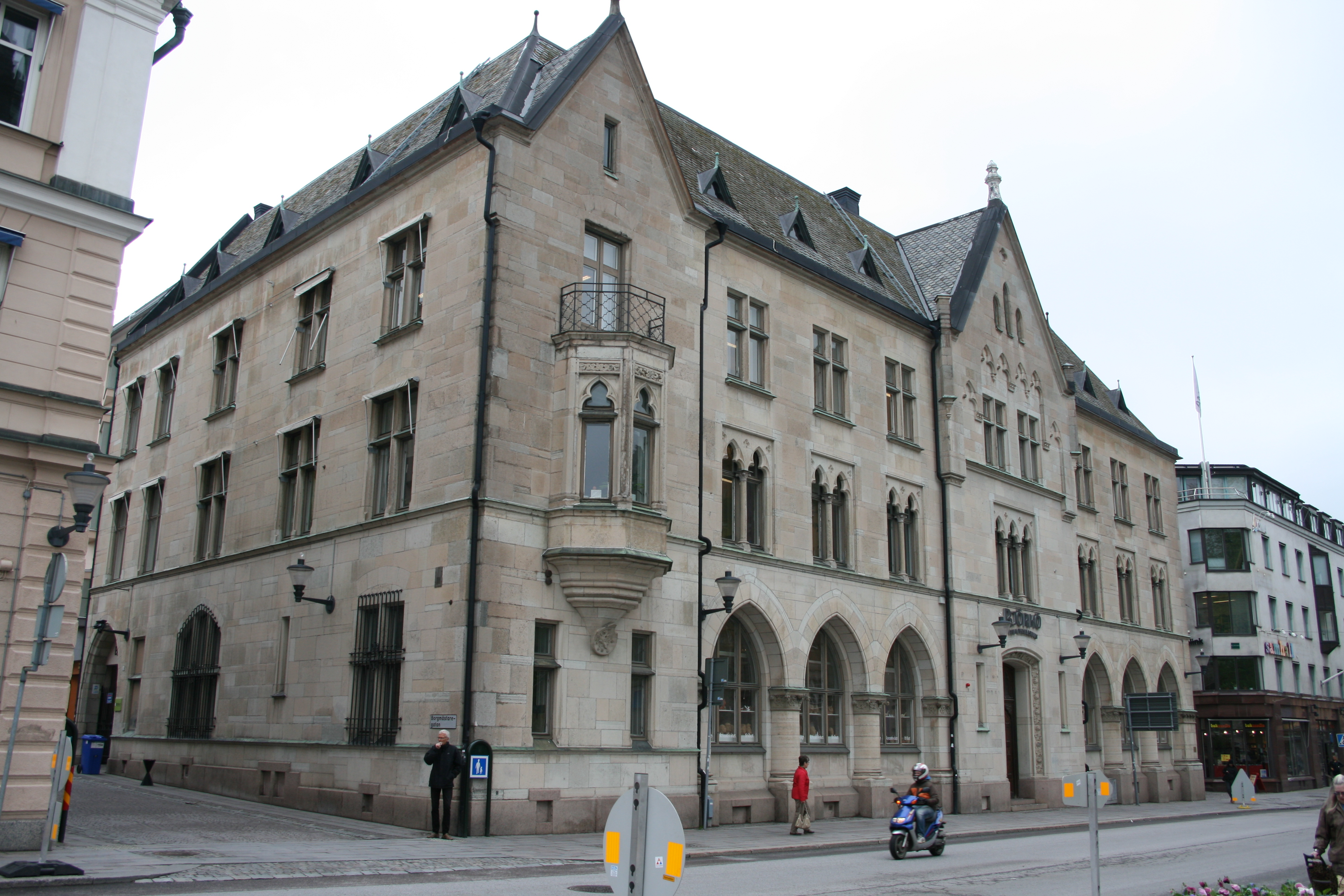 Gamla Riksbankshuset vid Sankt Larsgatan 26, Linköping. Numera en skola.